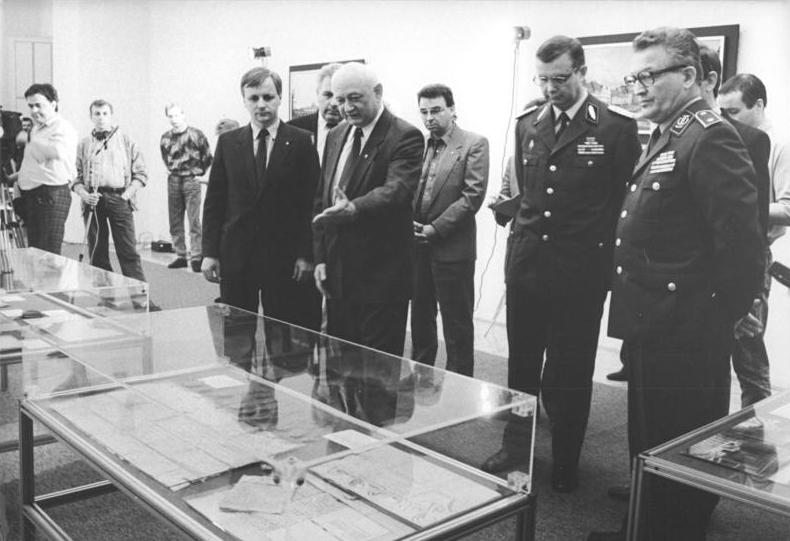 ADN-ZB Grimm 20.4.89 Berlin: 32 kulturhistorisch wertvolle Dokumente sind durch enge Zusammenarbeit von Kriminalpolizei und Zollorganen der DDR vor Verlust bewahrt worden. Das den Staatsarchiven gehörende geschützte Kulturgut übergab der Stellvertreter des Leiters der Zollverwaltung der DDR für Fahndungswesen, Hauptinspekteur Henry Otto (1.v.r.), dem Stellvertreter des Ministers des Innern Generalmajor Dieter Winderlich (2.v.r.) (Prof. Dr. Friedrich Beck - Mitte, vor der Vitrine - Direktor des Staatsarchivs Potsdam.)